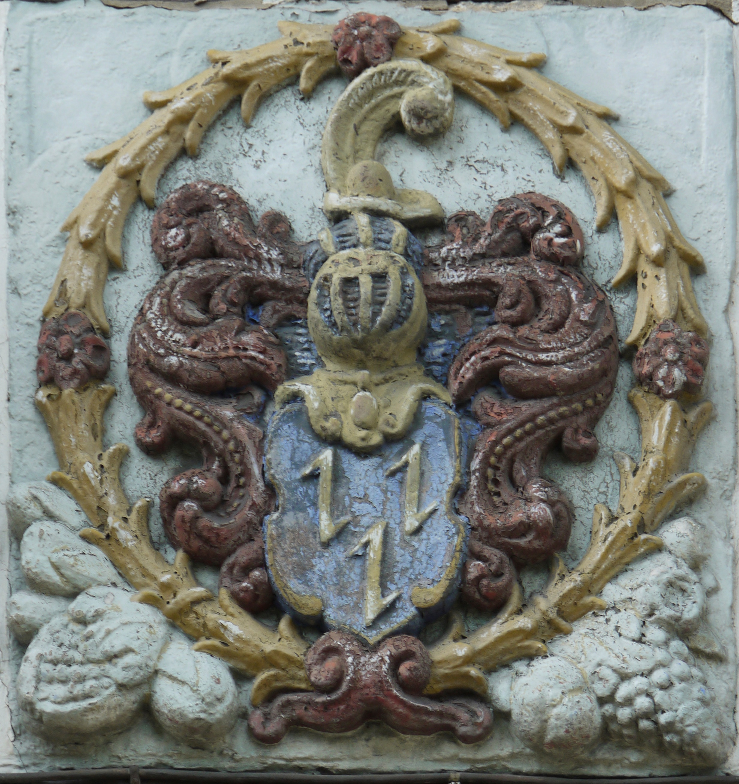 Wappen der Familie von Brabeck (Jobst Edmund von Brabeck 1619–1702) an der ehemalige Mahlmühle in Kunigunde